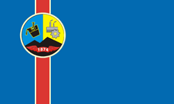 Прапор міста Стаханов